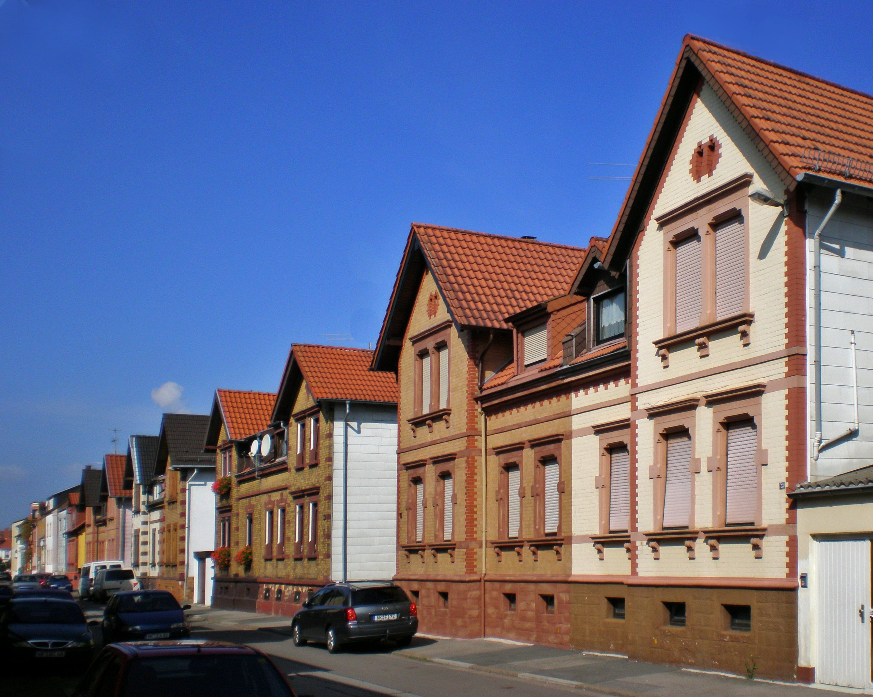 Beethovenstraße in Spiesen-Elversberg, Ortsteil Elversberg